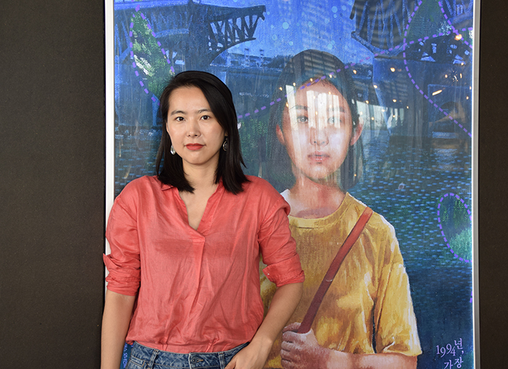 영화 벌새의 김보라 감독 2019